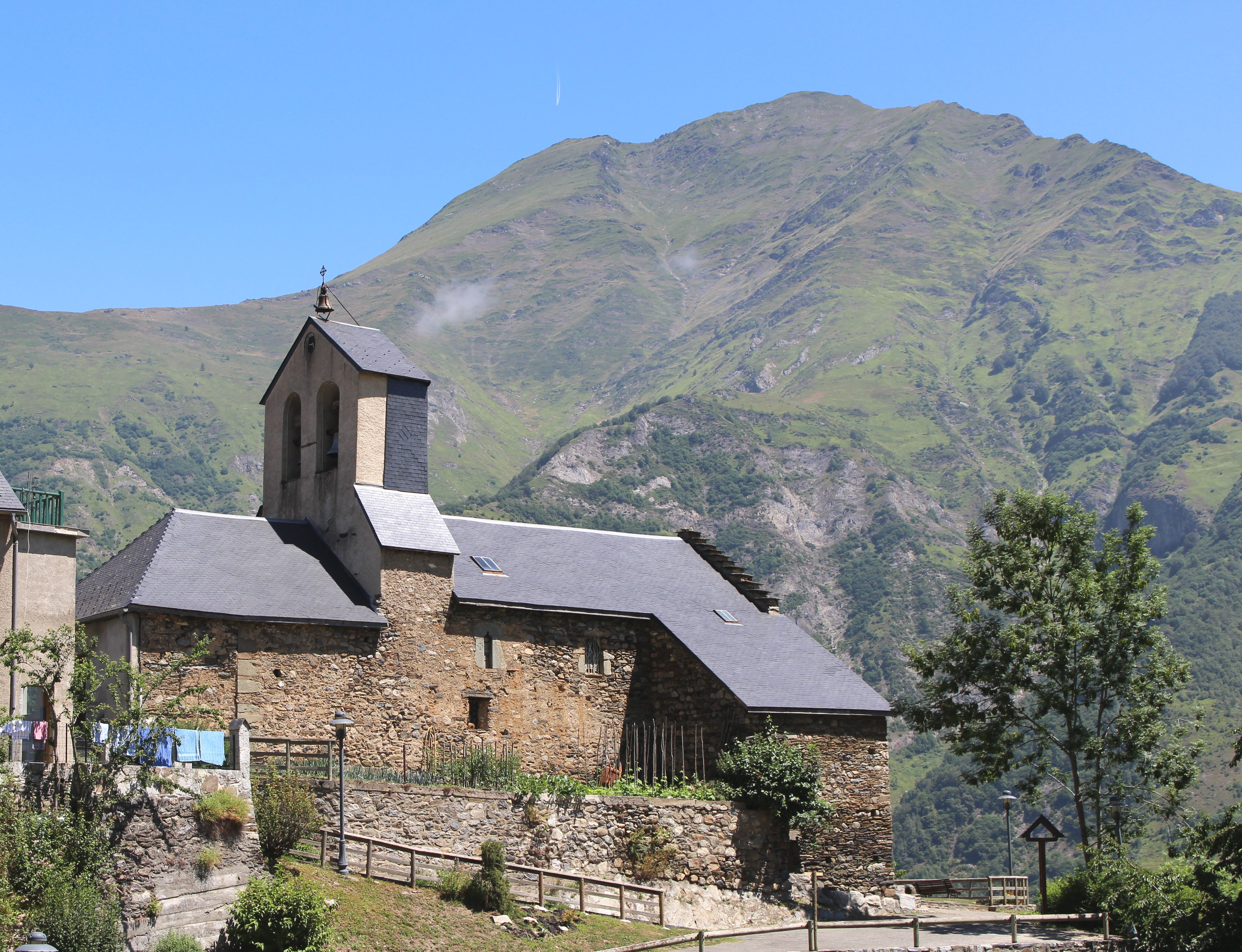 Église Saint-Martin de Grust (Hautes-Pyrénées)